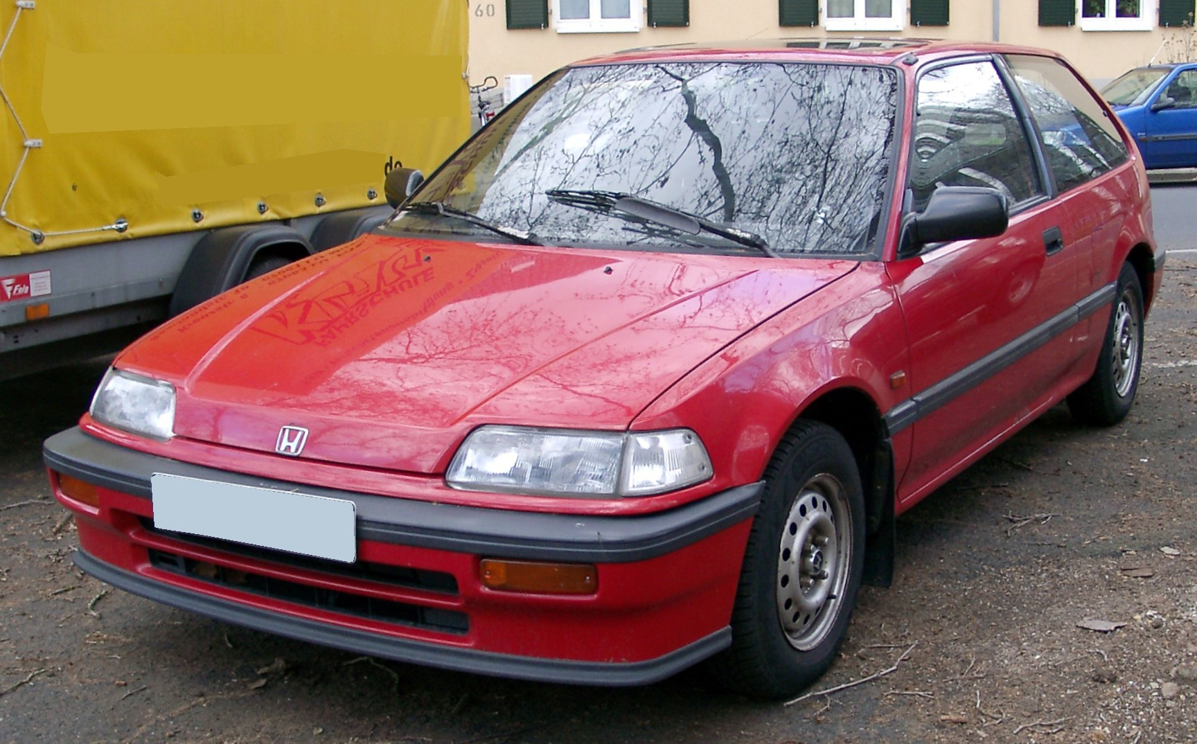 Honda Civic, 4. Generation